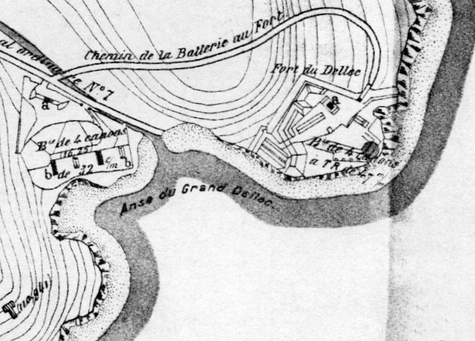 Mappa del forte di Dellec